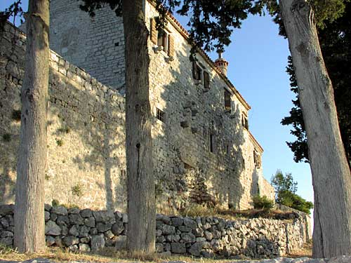 Ćokovac